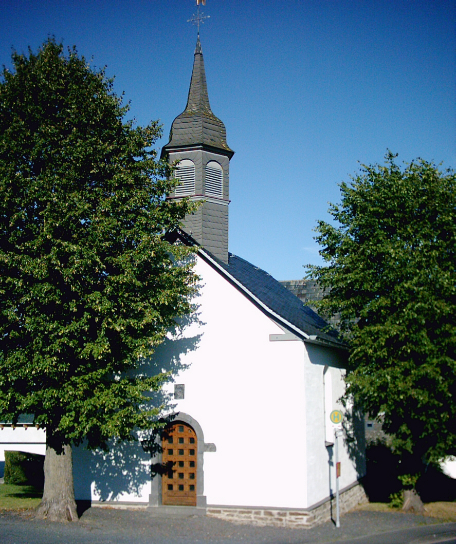 Reiferter Kapelle, Roßbach